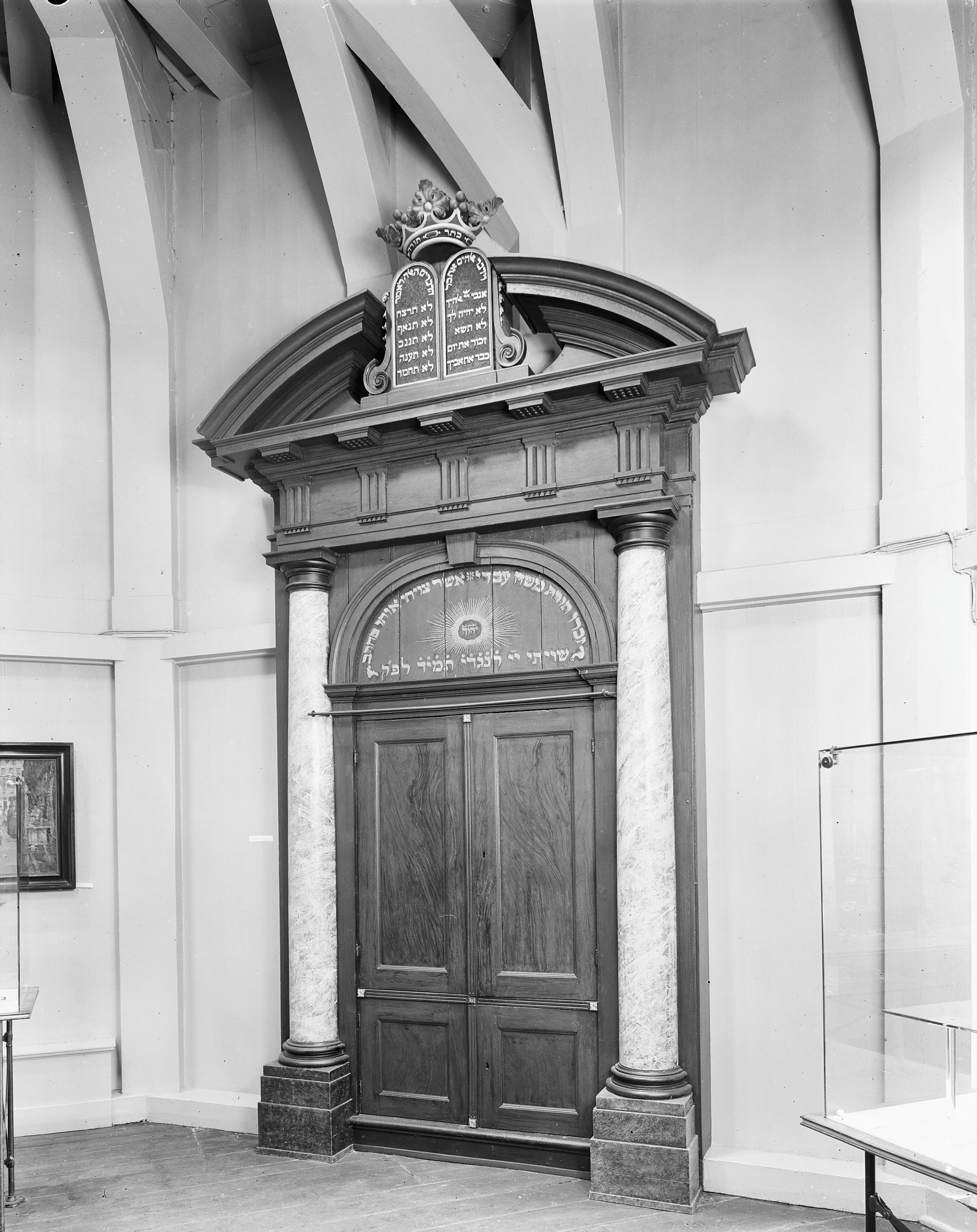 Nieuwe Synagoge: Heilige Arke uit 1791 uit de synagoge van Enkhuizen, thans in het Joods Historisch Museum te Amsterdam